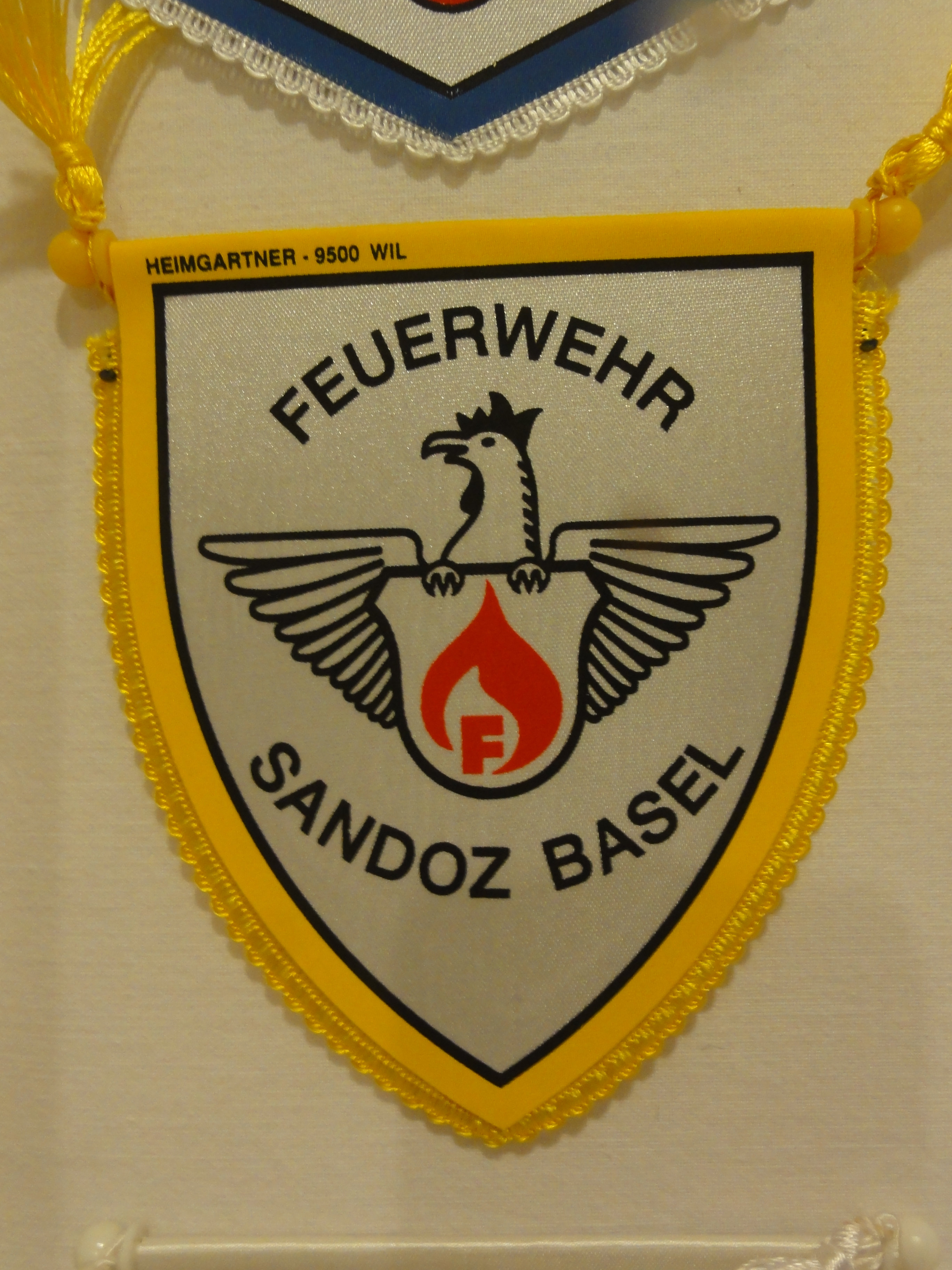 Basel — Schweizerisches Feuerwehrmuseum Basel-Stadt